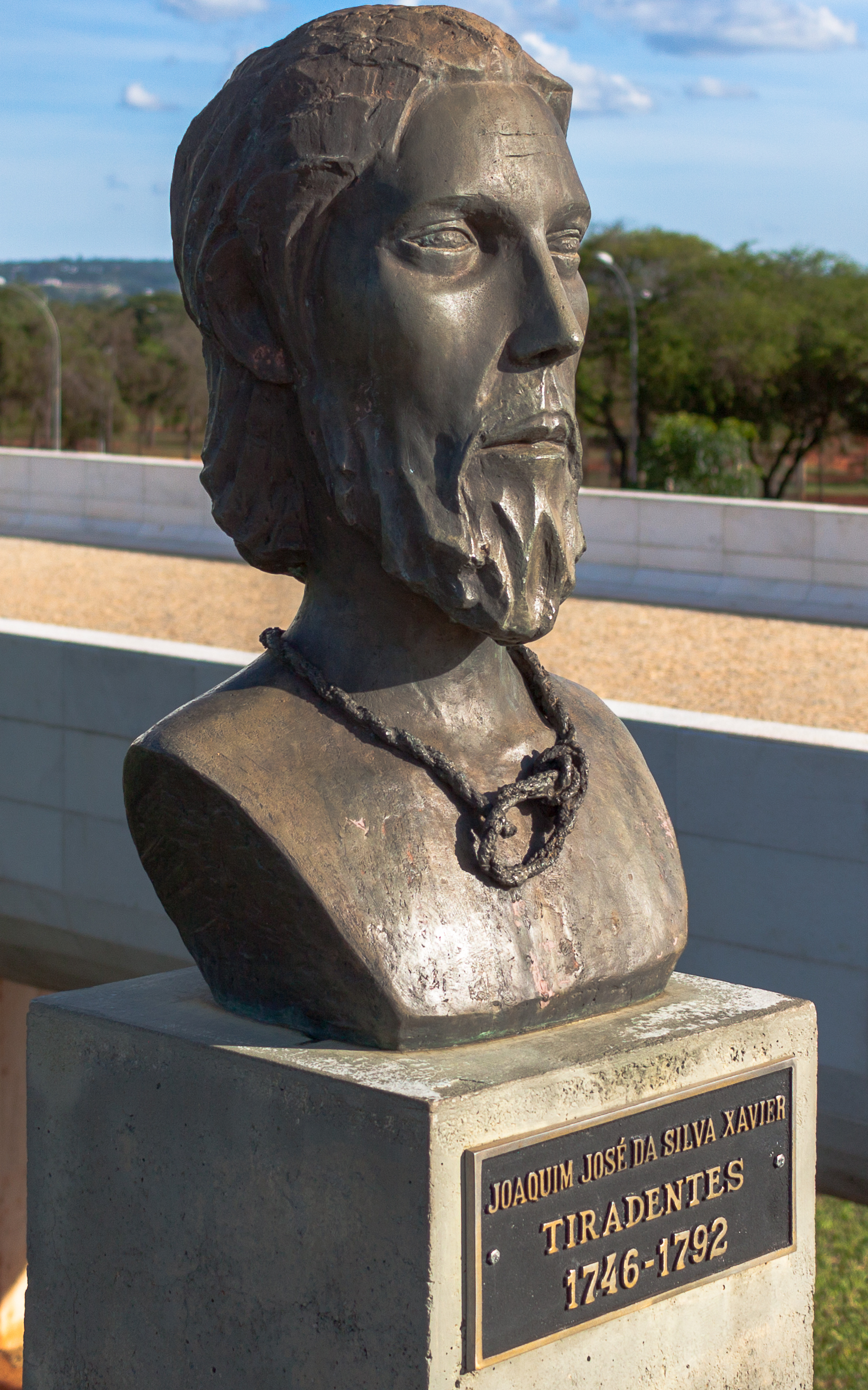 Herma de Tiradentes, em bronze, se encontra à esquerda da rampa de acesso ao Panteão da Pátria e da Liberdade Tancredo Neves.